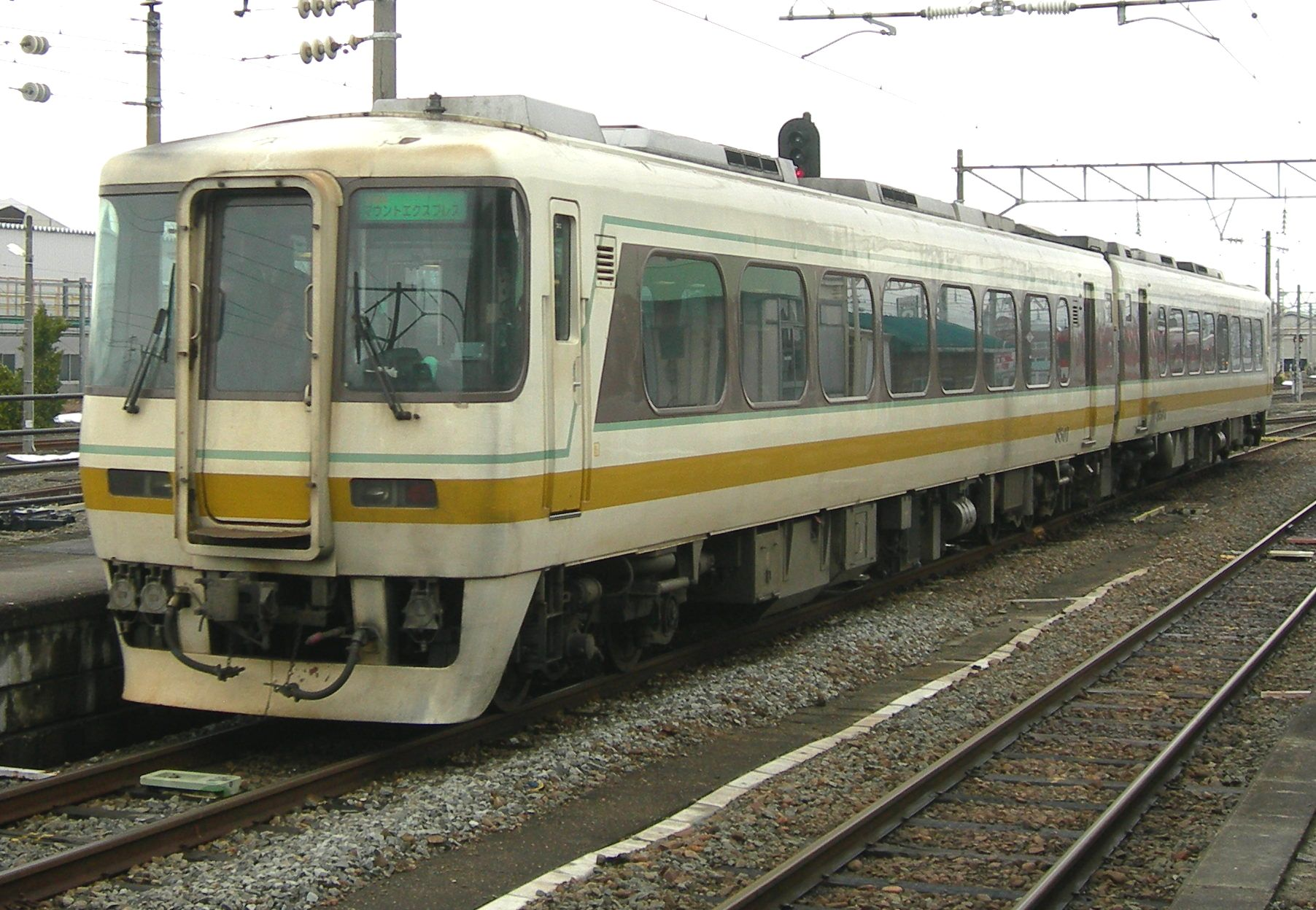 会津鉄道キハ8500系気動車